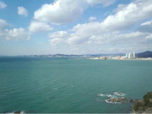 和歌山市・海南市沖の海。海南市冷水より撮影。